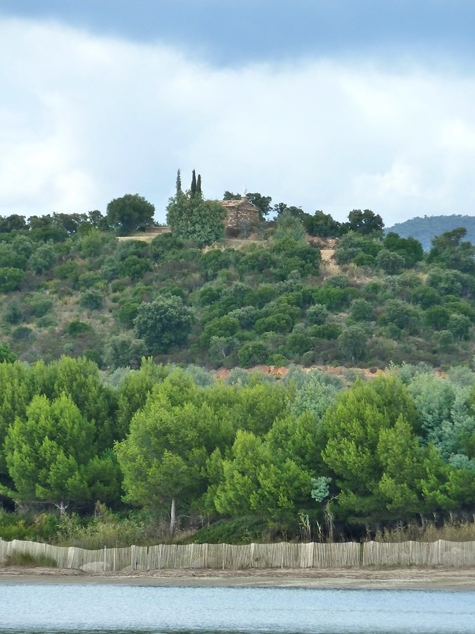 Chapelle de Saint-George à Léoube Bormes les Mimosas Var France